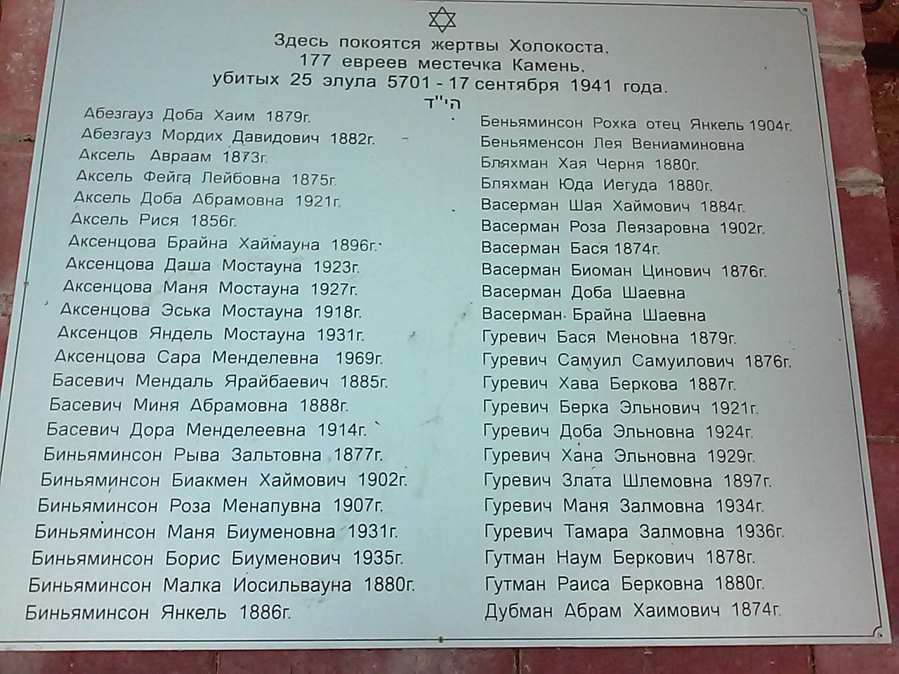 Часть списка убитых евреев деревни Камень Лепельского района, убитым нацистами 17 сентября 1941 года. Находится на памятнике, расположенном примерно в полукилометре севернее деревни, после кладбища, слева от дороги в урочище Борки